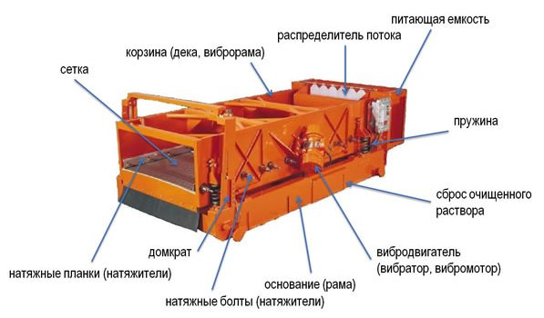 Основные компоненты вибрационного сита